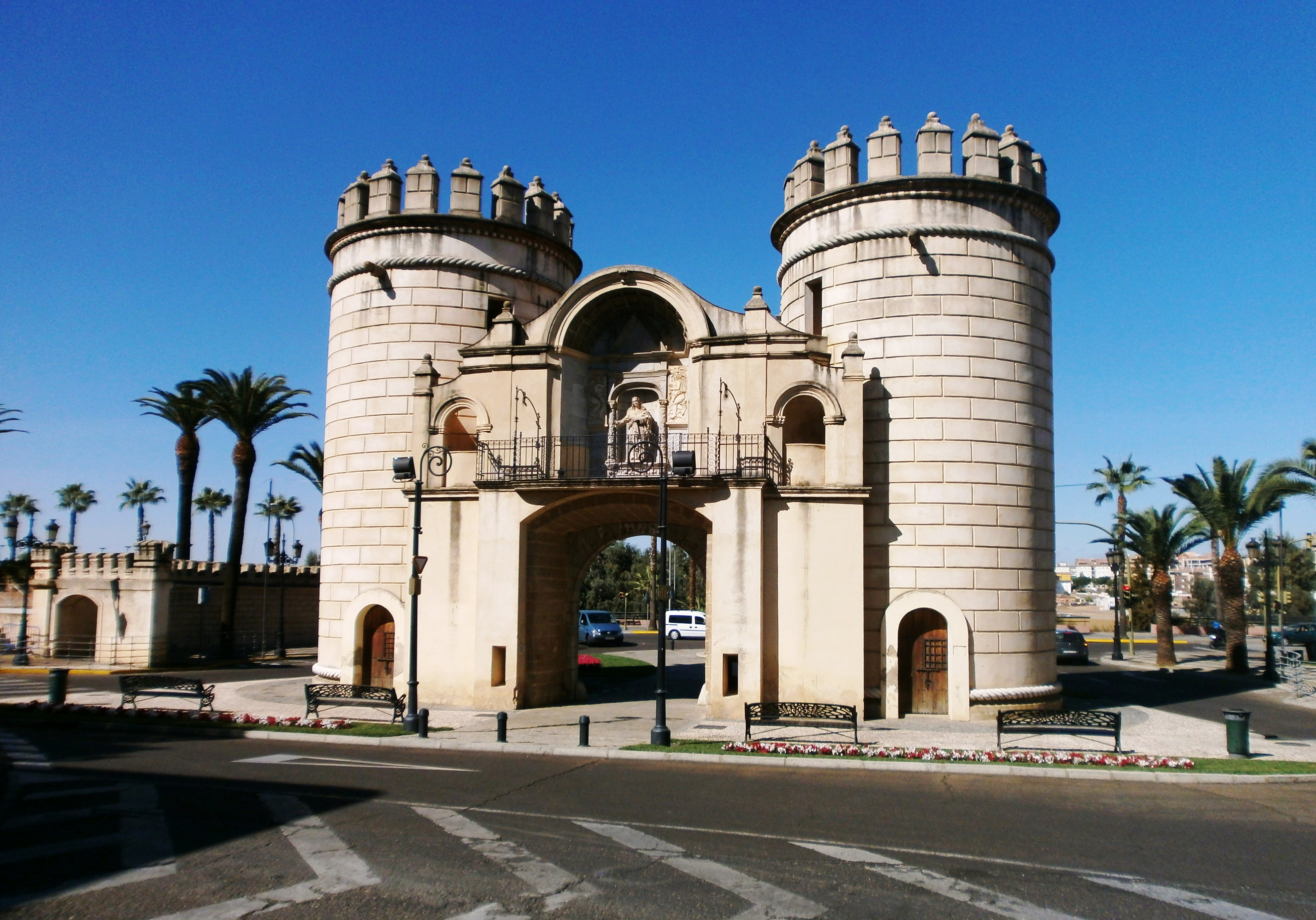 Puerta de Palmas